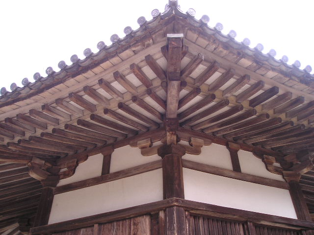 栄山寺八角堂